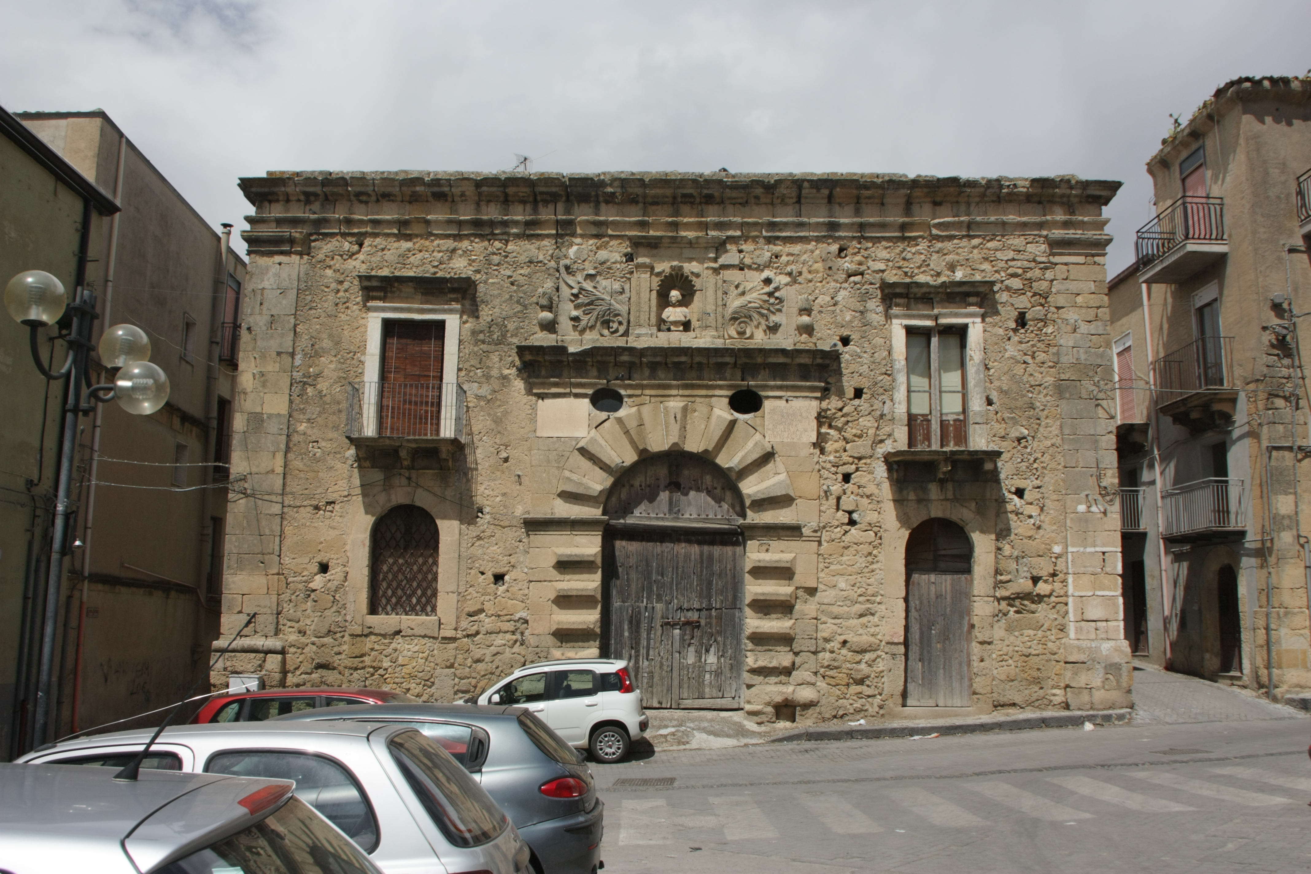 Scuderia Palazzo Branciforti This is a photo of a monument which is part of cultural heritage of Italy.